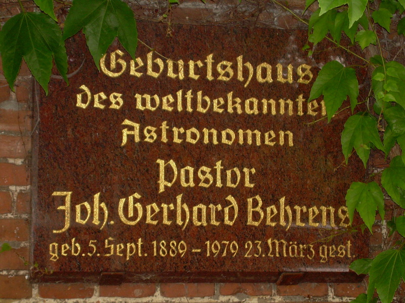 Gedenktafel am Geburtshaus von Johann Gerhard Behrens (* 5. September 1889 in Esens; † 23. März 1979 in Warsingsfehn) in Esens. Es befindet sich seitlich am Haus eines Elektroeinzelhandelsgeschäftes am Marktplatz von Esens/Ostfriesland, gegenüber vom Rathaus.